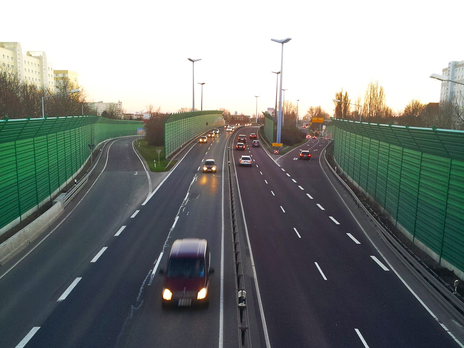 Magdeburger Ring (B 189) zwischen Magdeburg-Kannenstieg und Magdeburg-Neustädter See, Abfahrt Ebendorfer Chaussee (B 71)